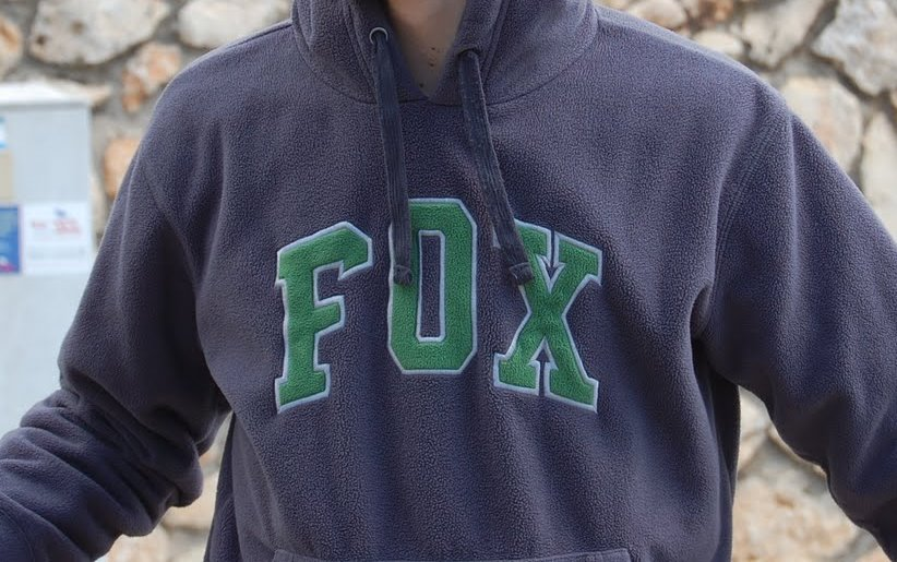 קפוצ'ון של פוקס